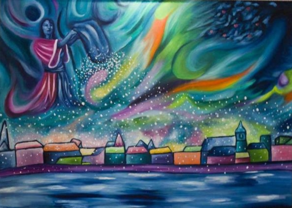 Frau Holle - Olio su tela 50x70 - Dipinto da Mauro Breda